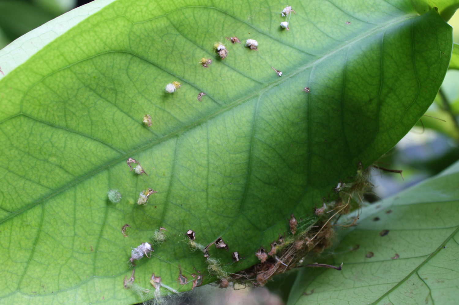 தையல்சிட்டு கூட்டின் வெளிப்புறம்